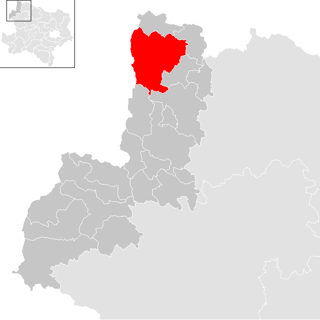 Bezirk Gmünd